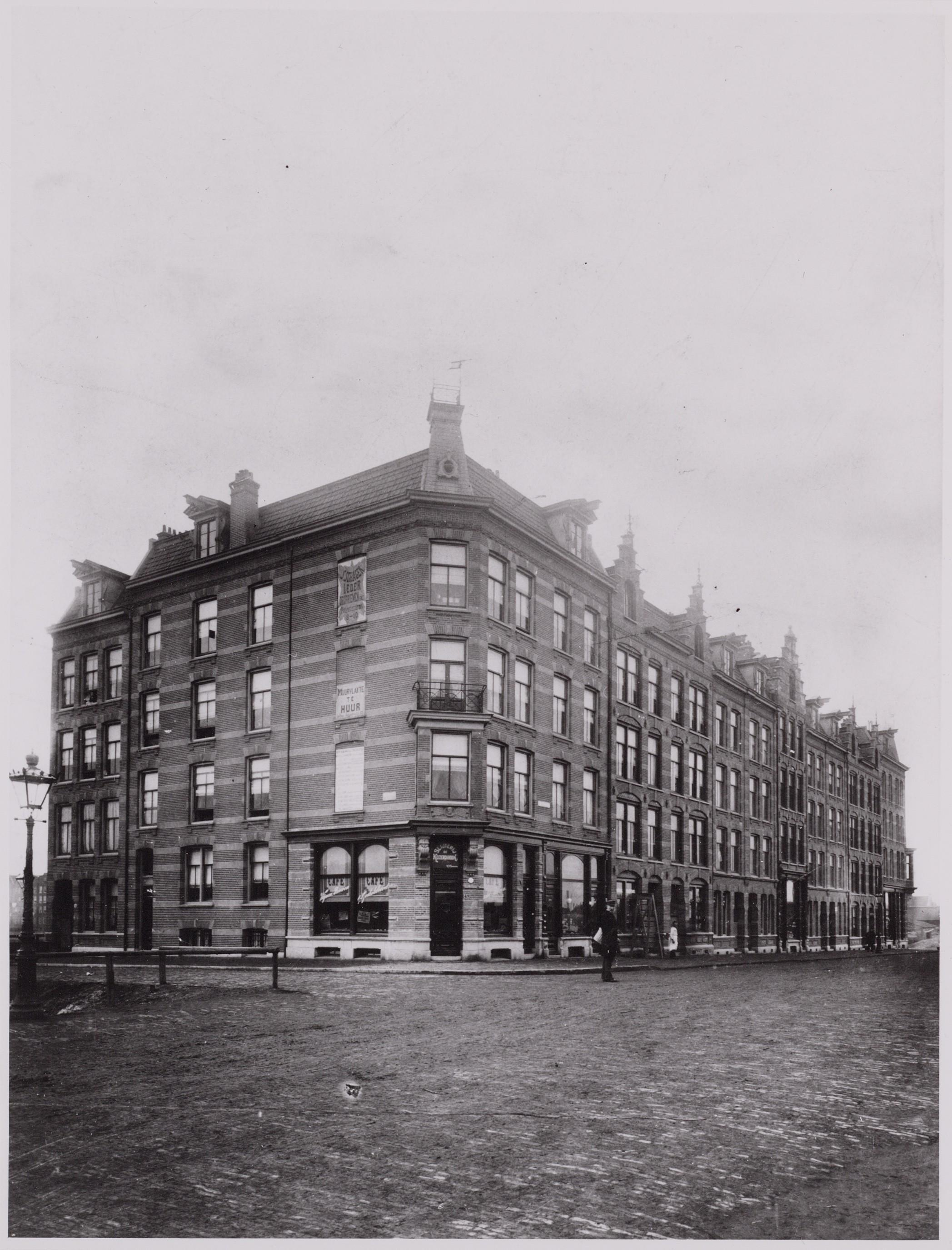 Beschrijving Potgieterstraat 49-73 met links de Da Costakade 114 Documenttype foto Vervaardiger Onbekend Anoniem Collectie Collectie Stadsarchief Amsterdam: foto-afdrukken Datering 1892 ca. Geografische naam Da Costakade Potgieterstraat Inventarissen Afbeeldingsbestand OSIM00002000811